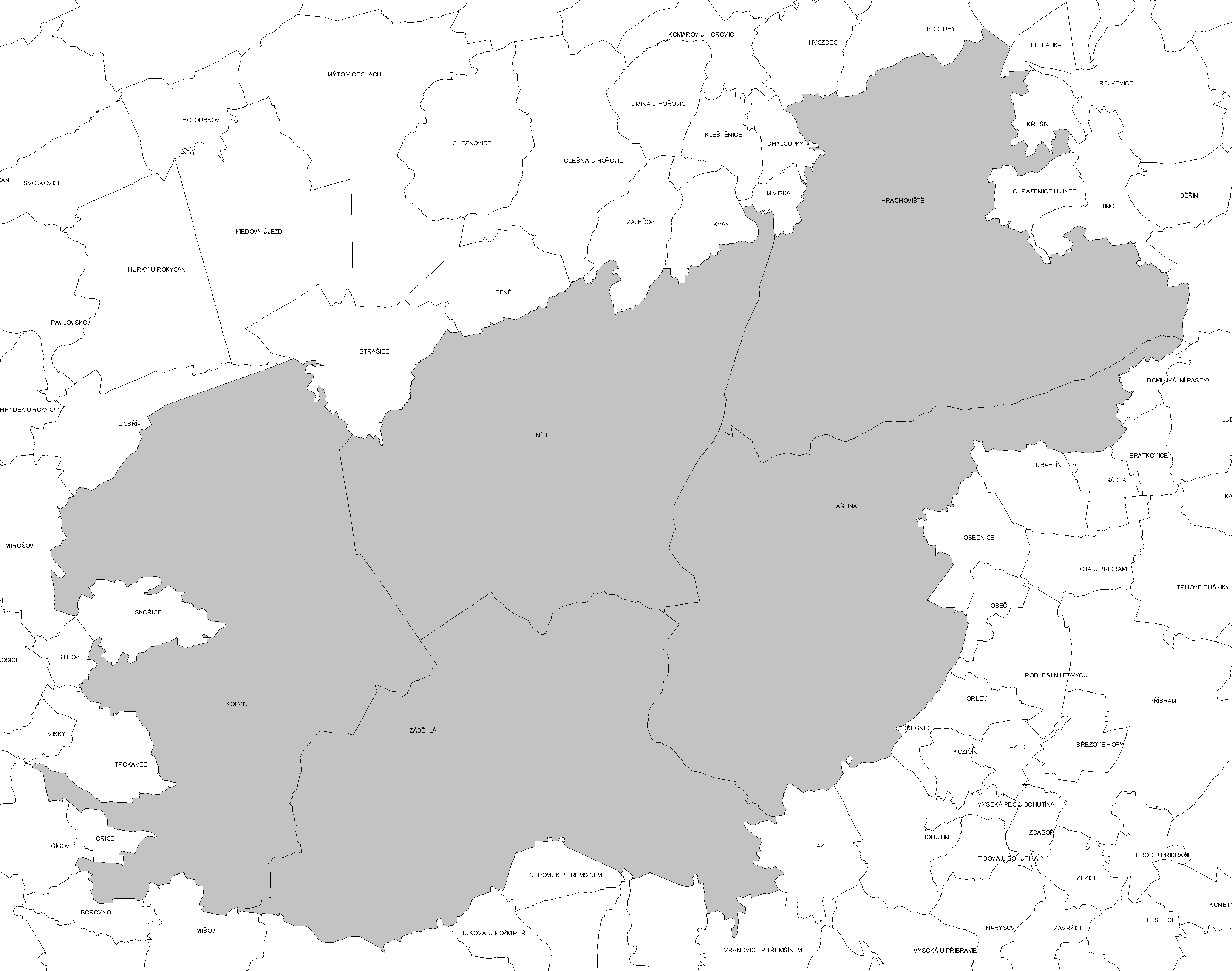 Katastr vojenského újezdu Brdy